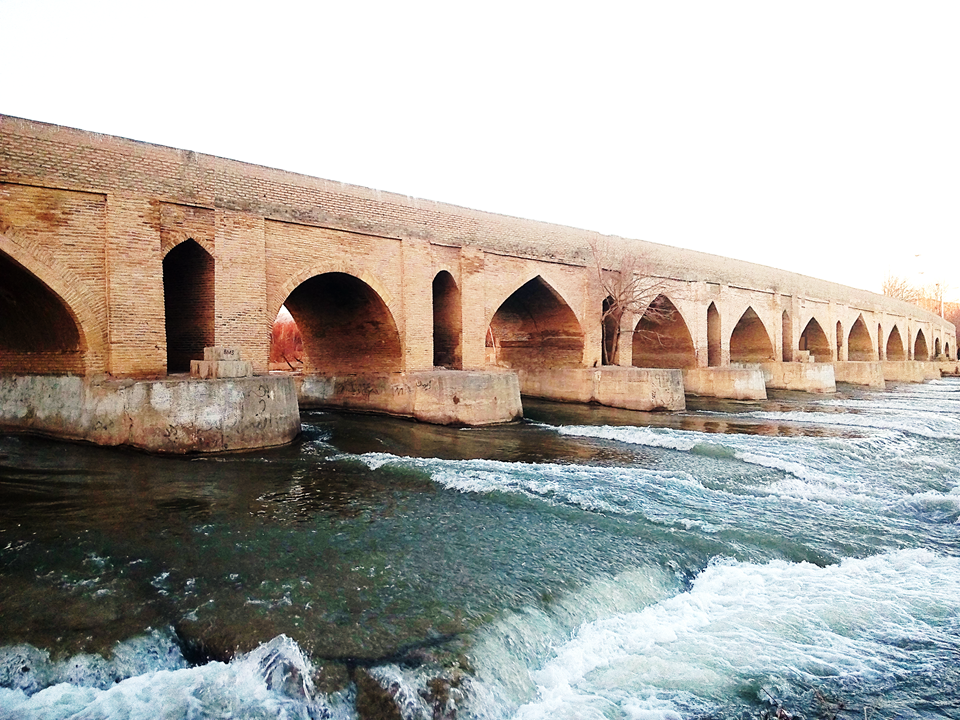 پل تاریخی بابا محمود سهرفیروزان